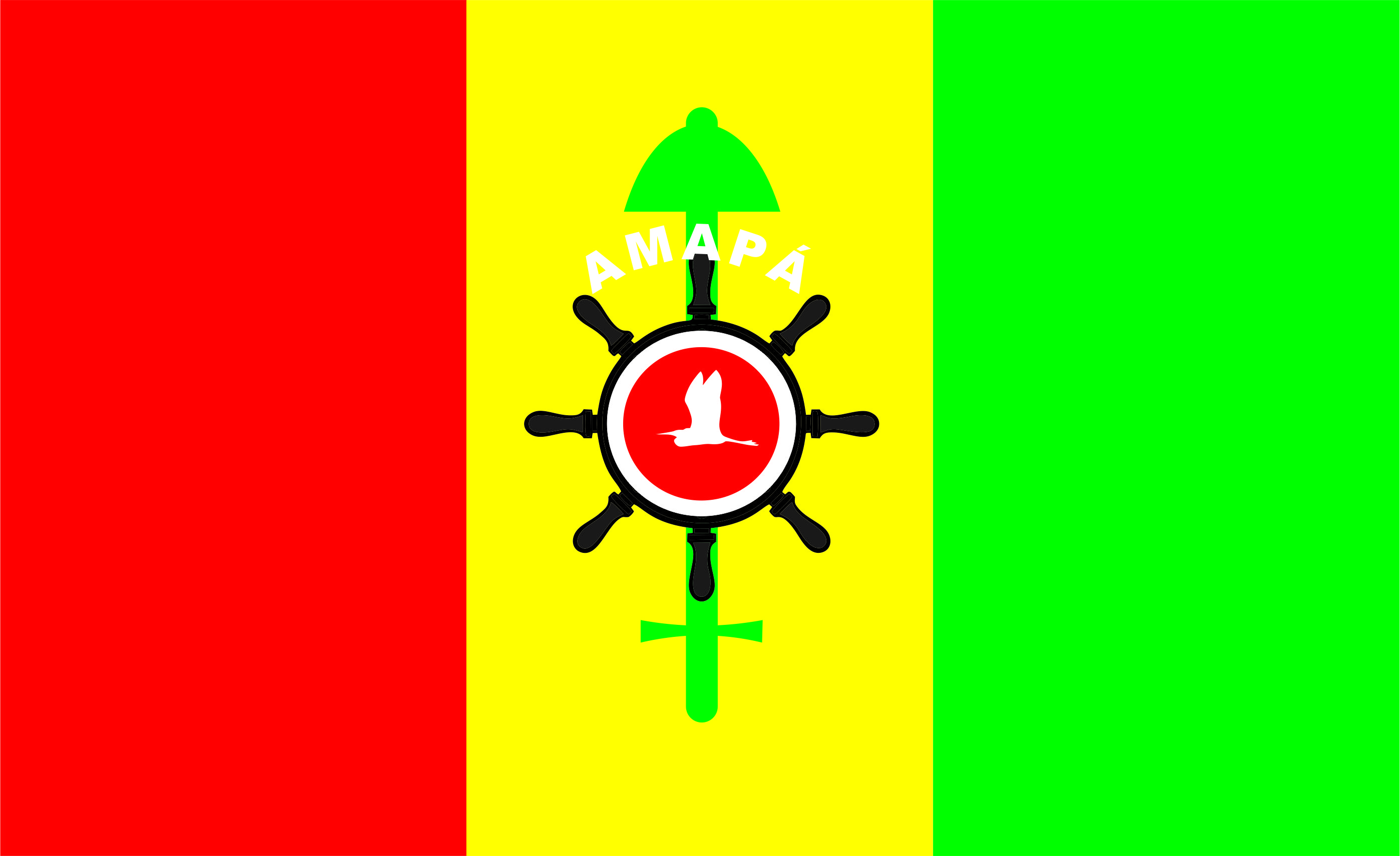 Bandeira do município de Amapá